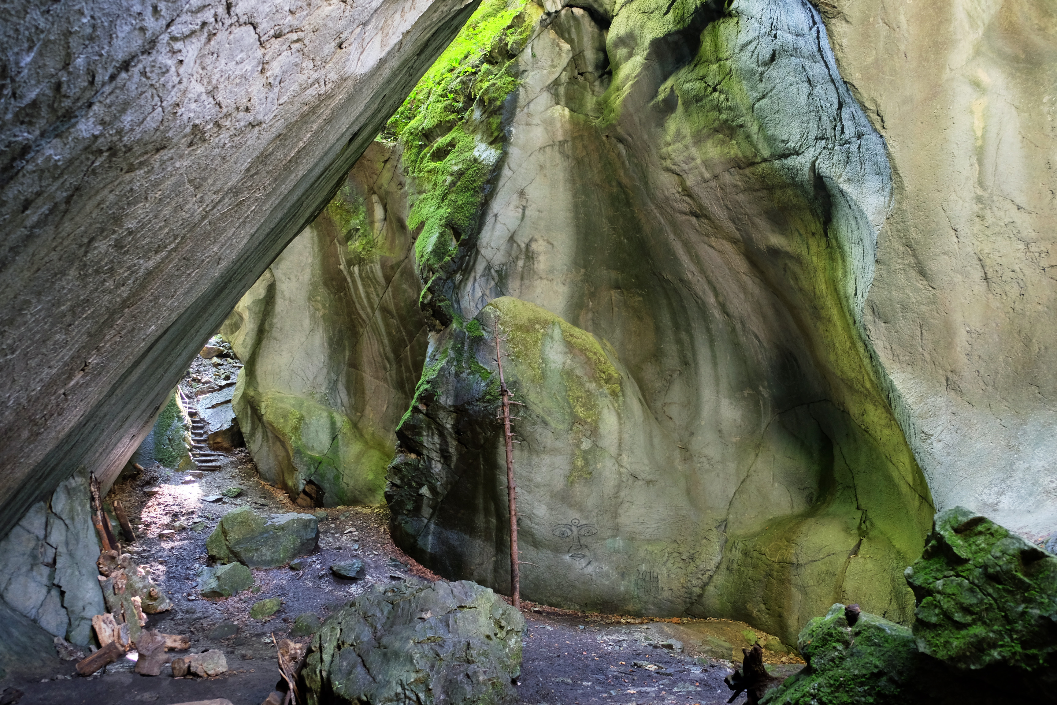 STADTWANDERUNG: Dornbirn – „Von Industrie- und Naturdenkmalen“ Dieses Bild wurde anlässlich des österreichischen Tags des Denkmals 2014 in Vorarlberg eingereicht.